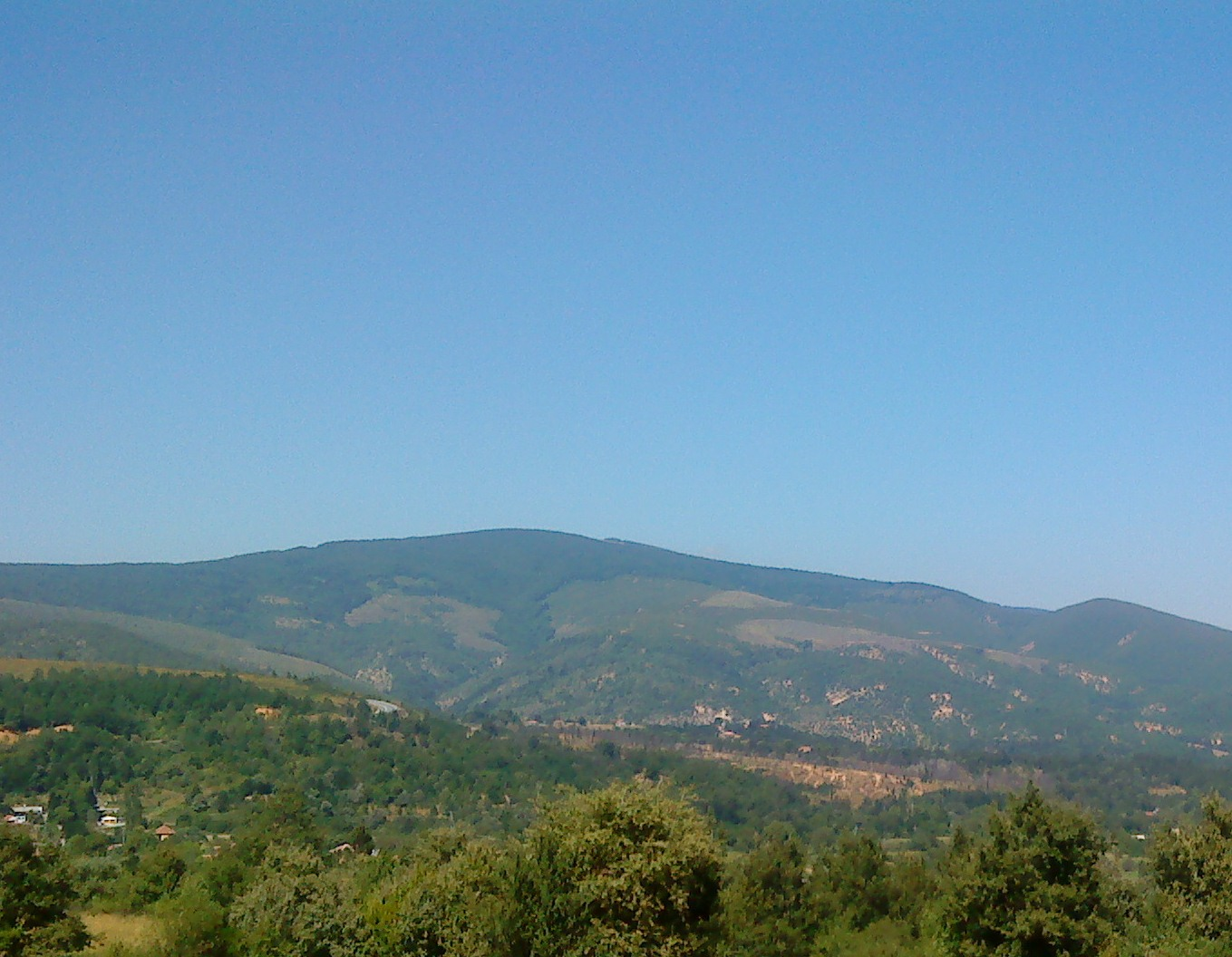 Поглед од село Кажани кон село Ѓавато